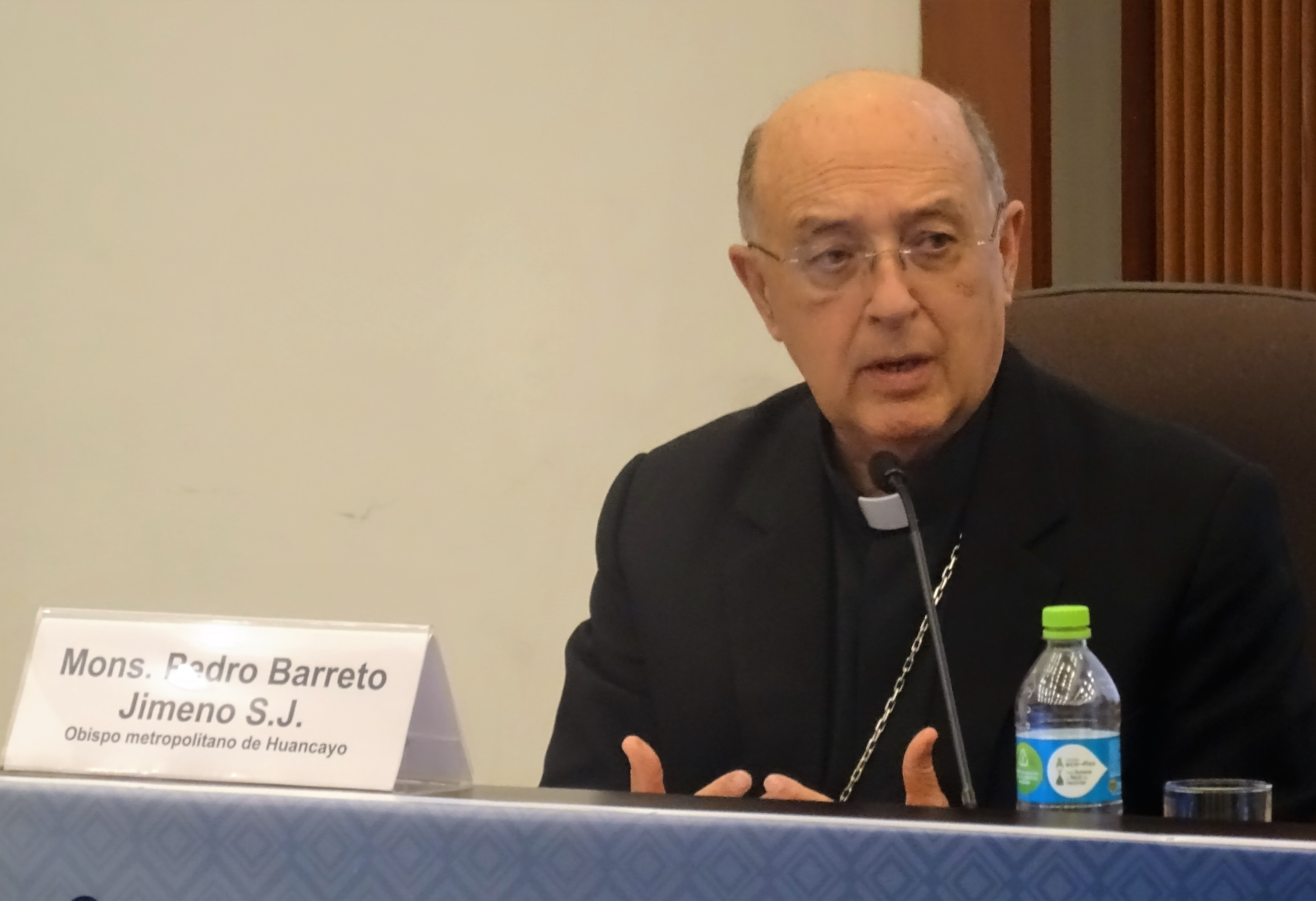 Monseñor Pedro Barreto Jimeno, S.J., en Aula Magna PUCP Siguiendo a Francisco, 2018.